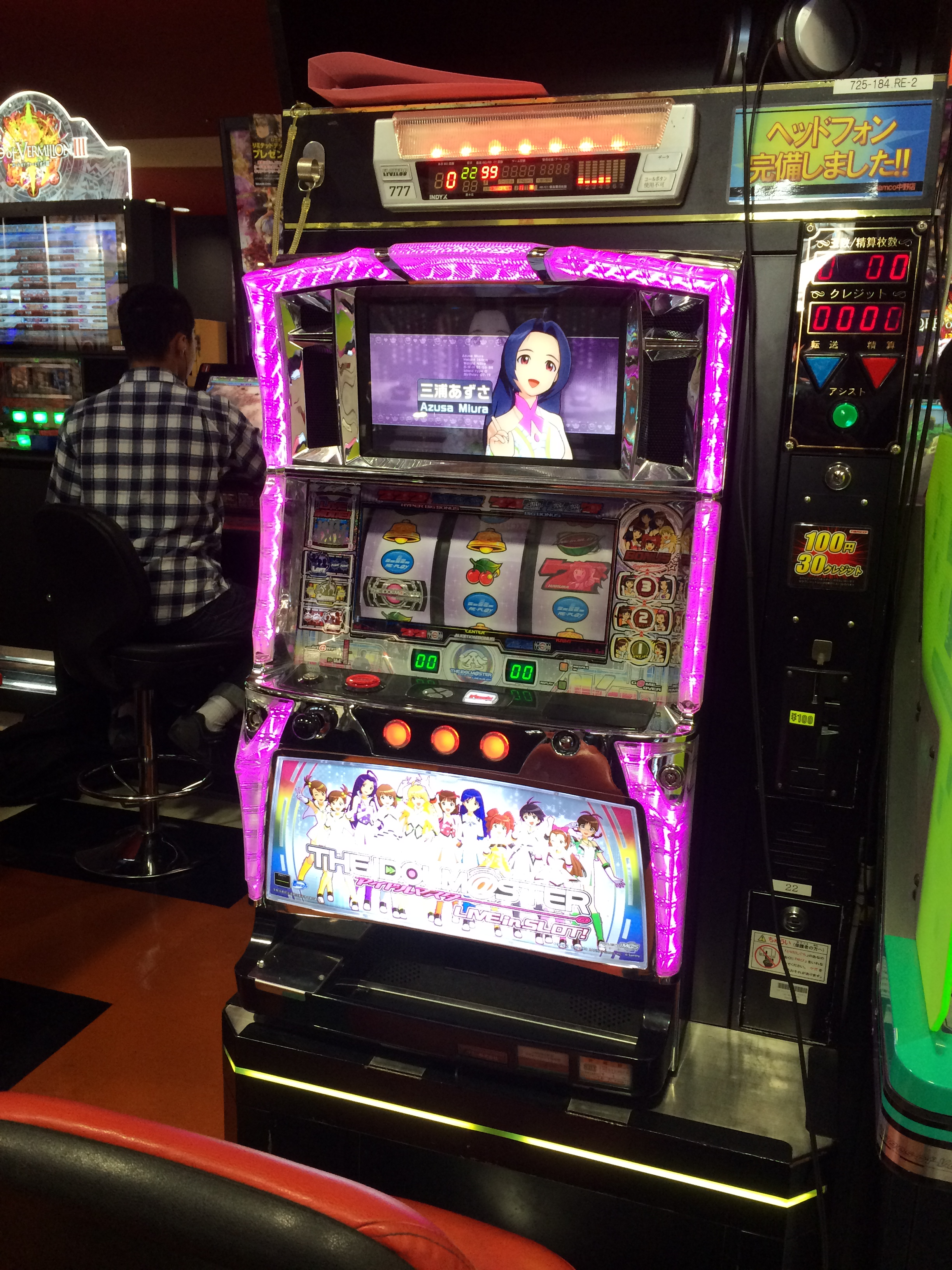 アイドルマスター LIVE IN SLOT! の筐体です